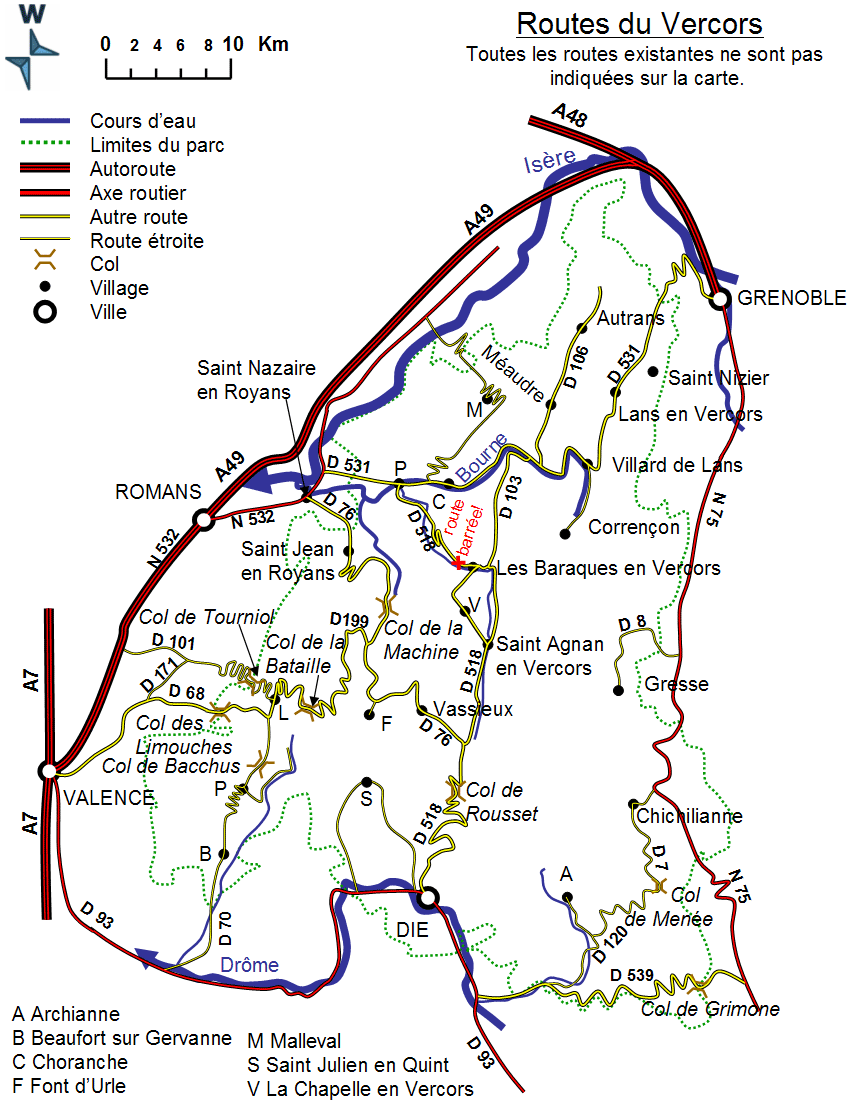 Une carte routière simplifiée du Vercors. CETTE CARTE N'EST PAS EXHAUSTIVE